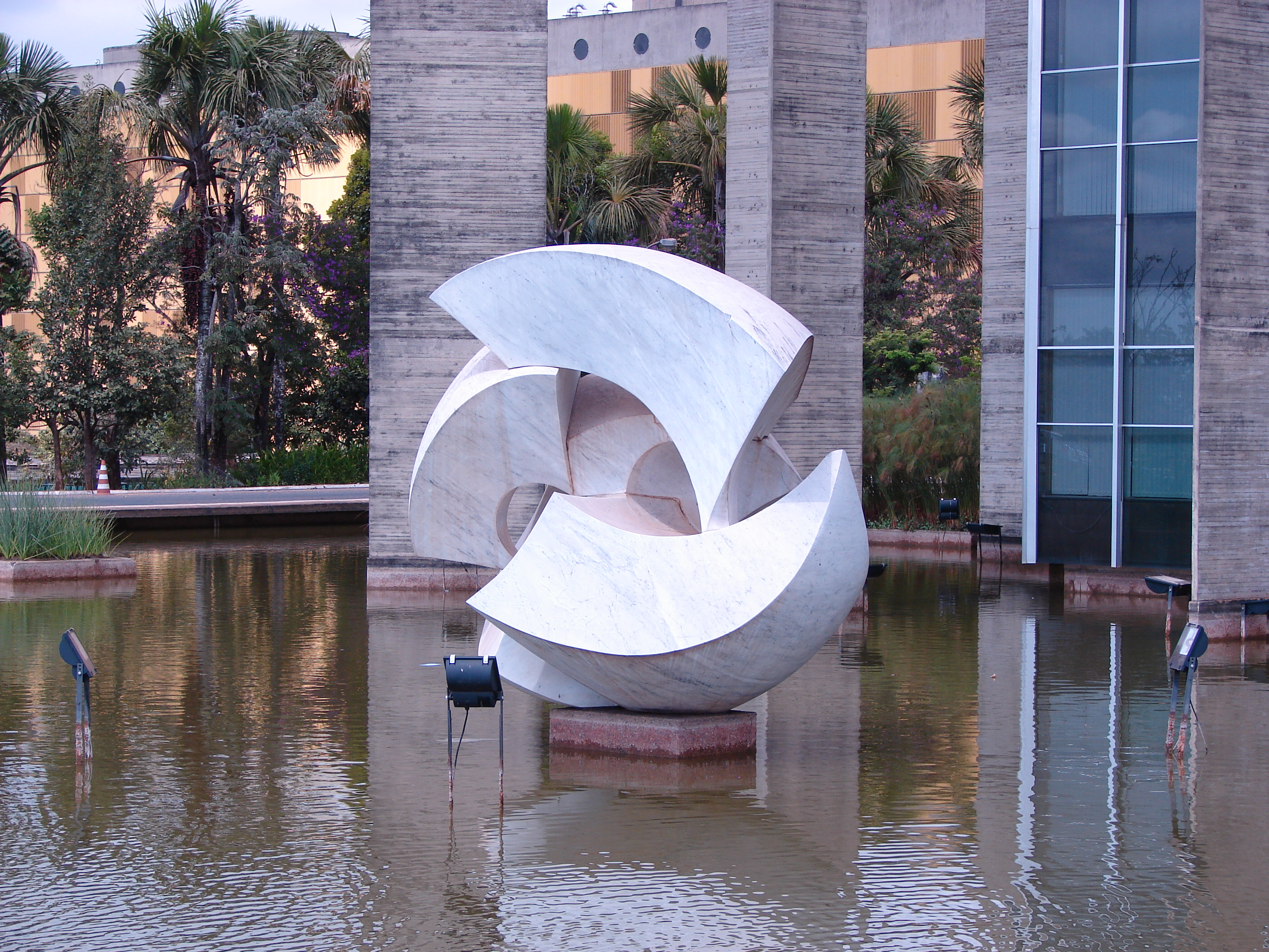 Itamarati